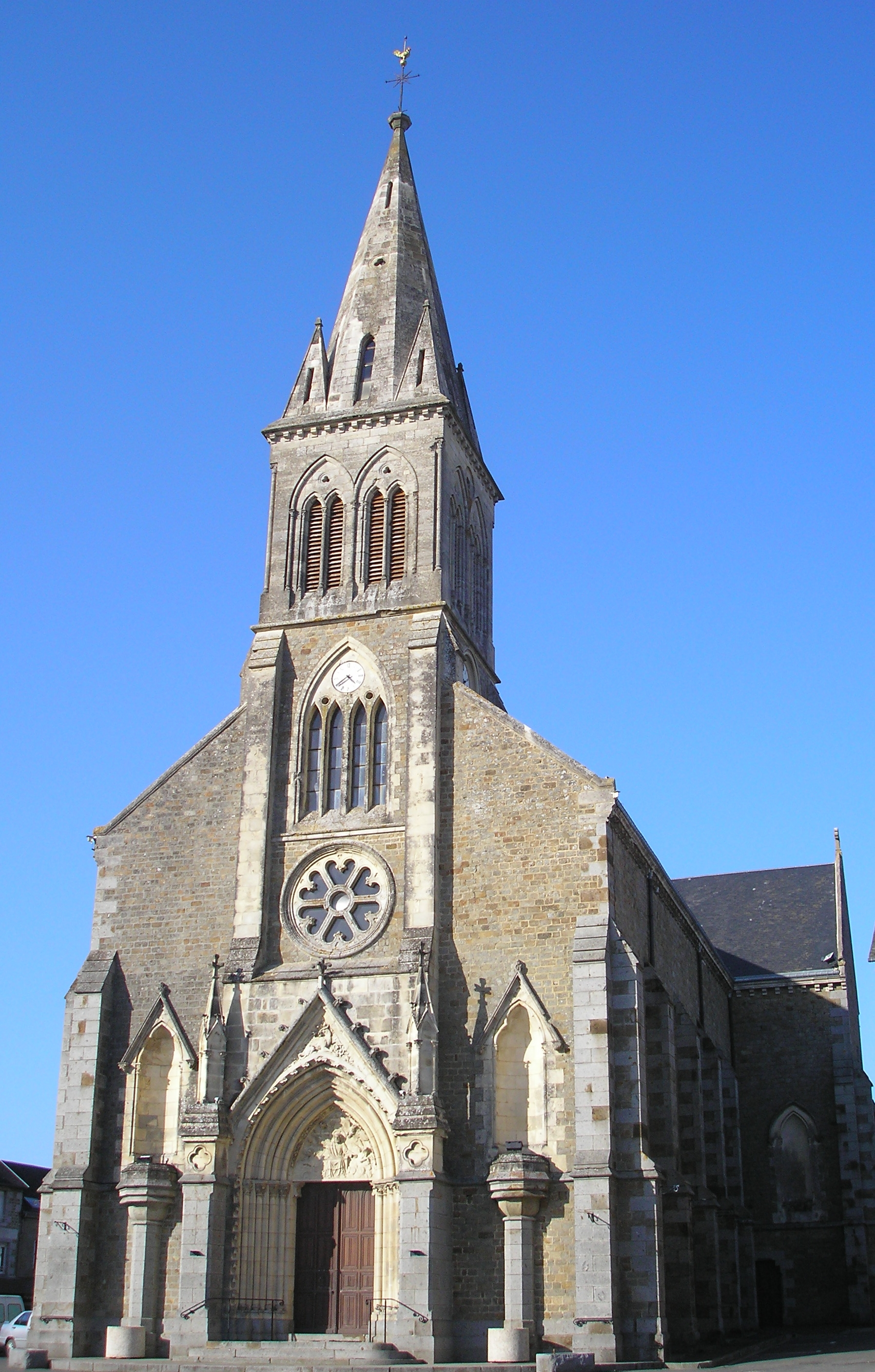 Briouze (Normandie, France). L'église.